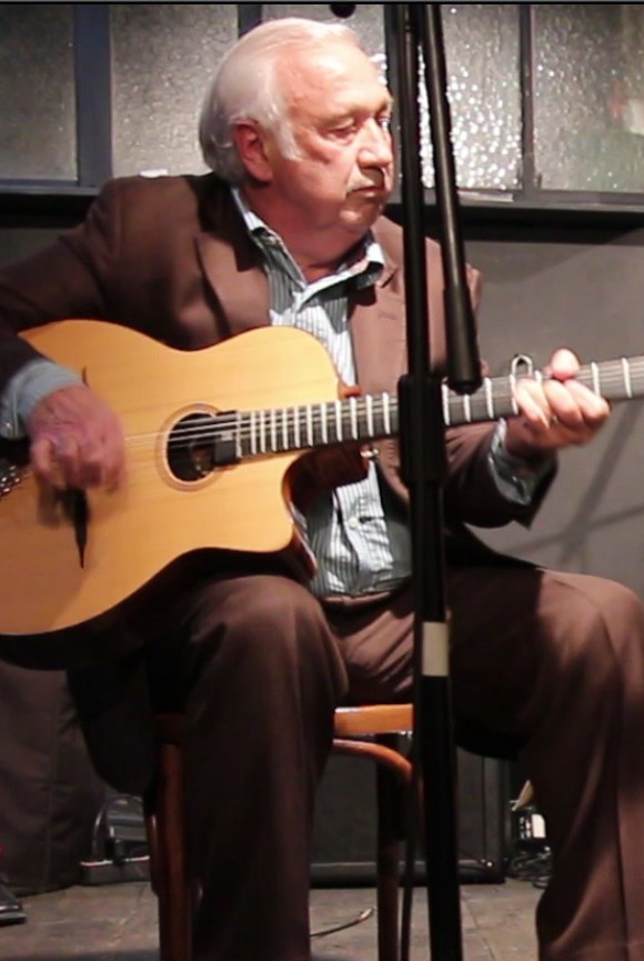 Marcel Campion accompagnant un jeune musicien à la guitare manouche dans un café de Saint-Ouen